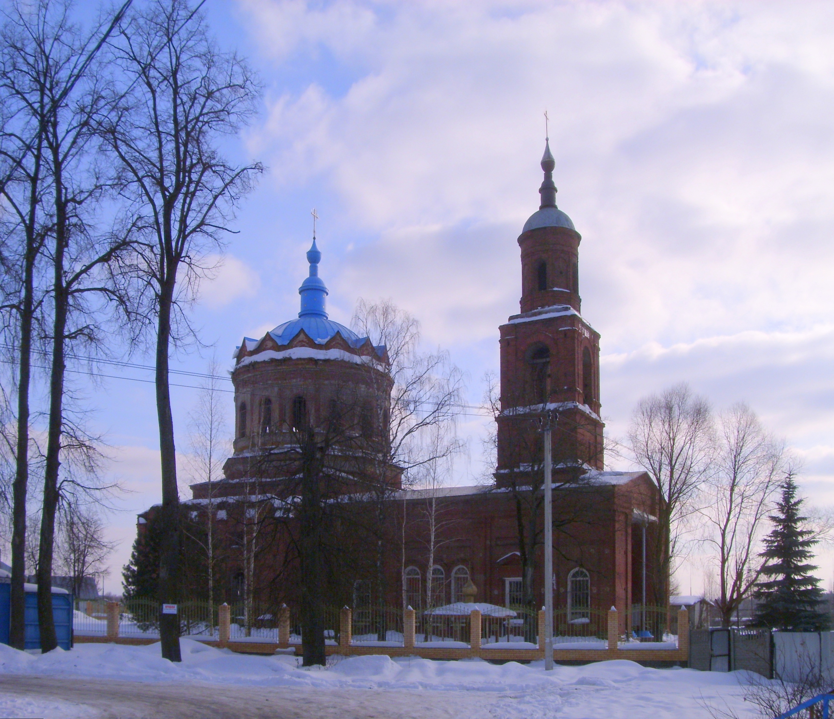 Покровская церковь (Брянская область, Дятьково, п. Ивот)